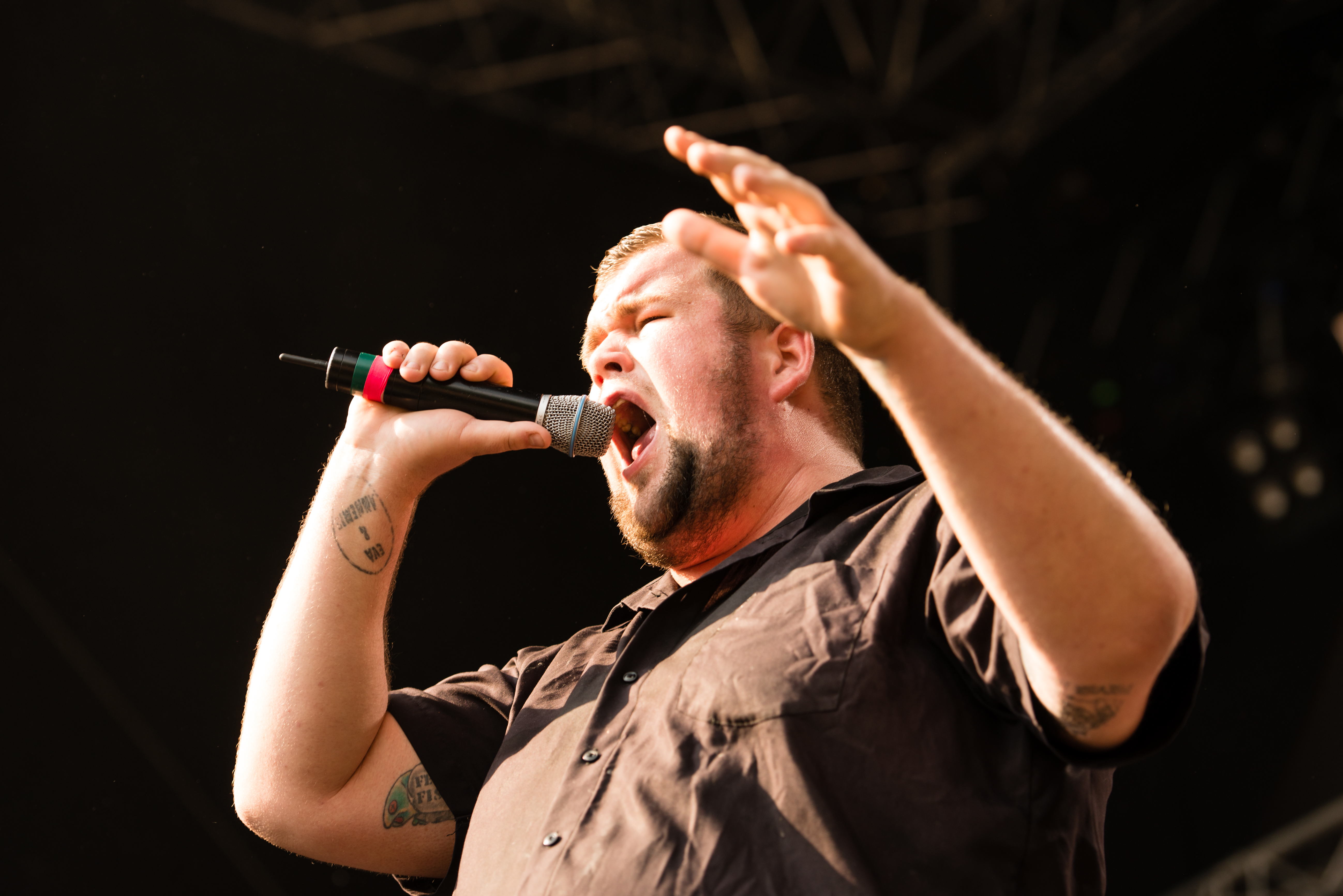 '32. Pfingst Open Air 2014 - Essen Werden': 'Feine Sahne Fischfilet'